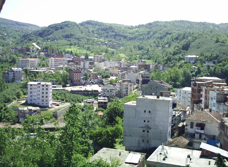 Resim tarafımdan çekildi.